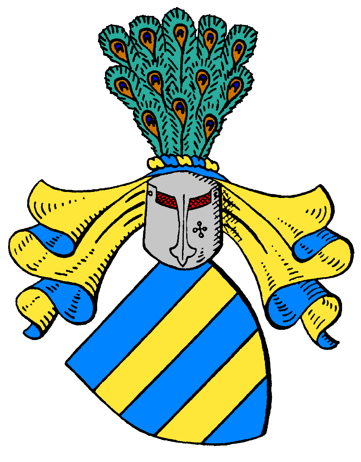 Wappen der von Bielke